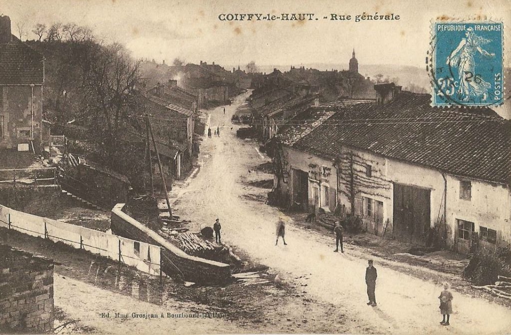 Carte postale La Grand-Rue vers 1926